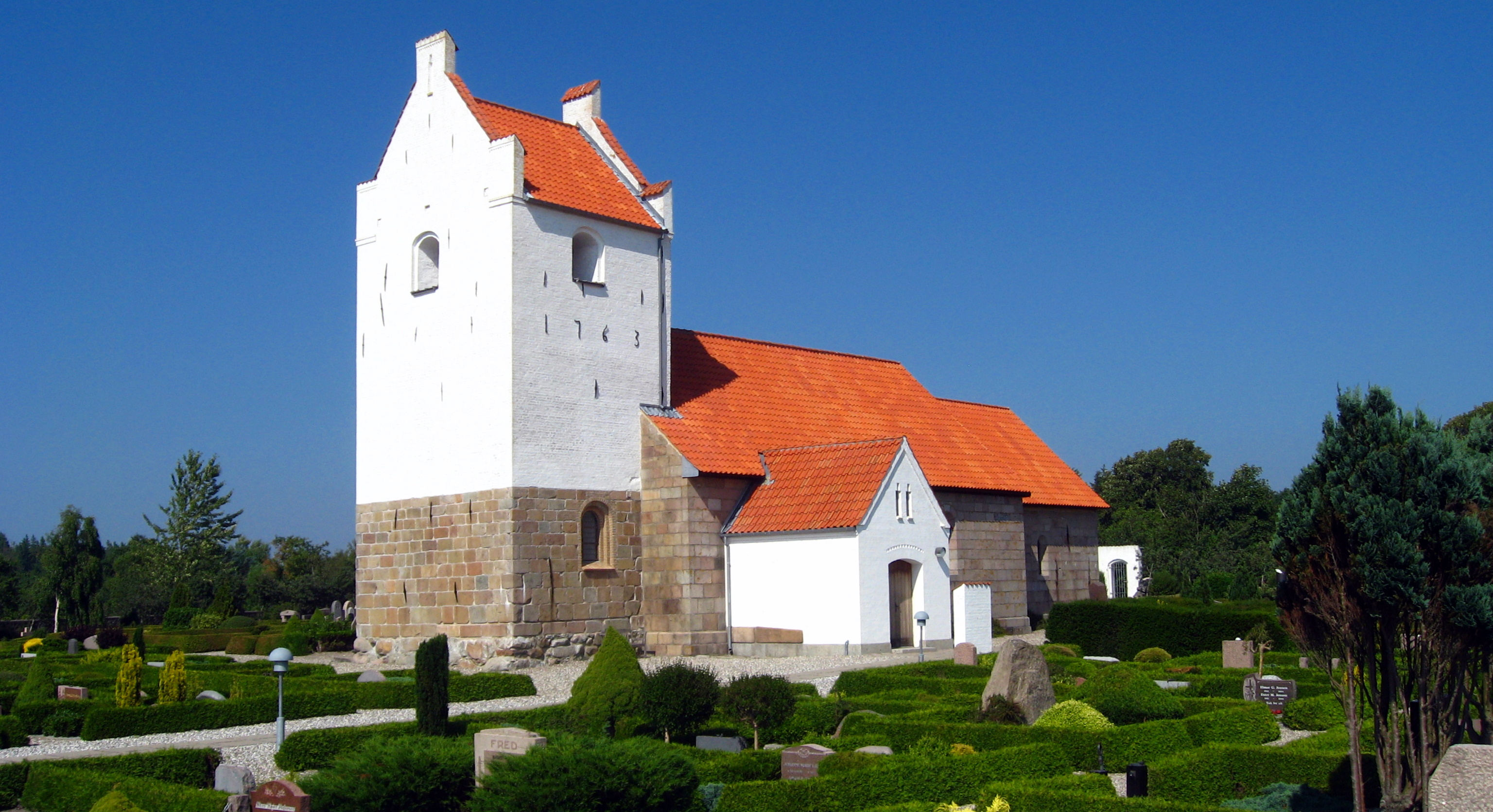 Tranum Kirke, Jammerbugt Kommune